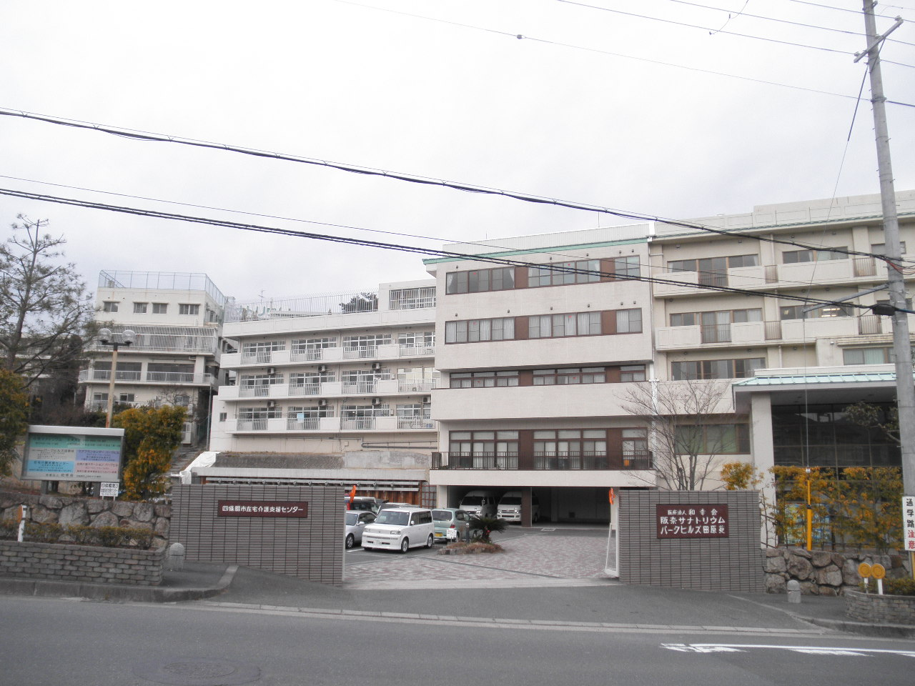 阪南サマトリウム